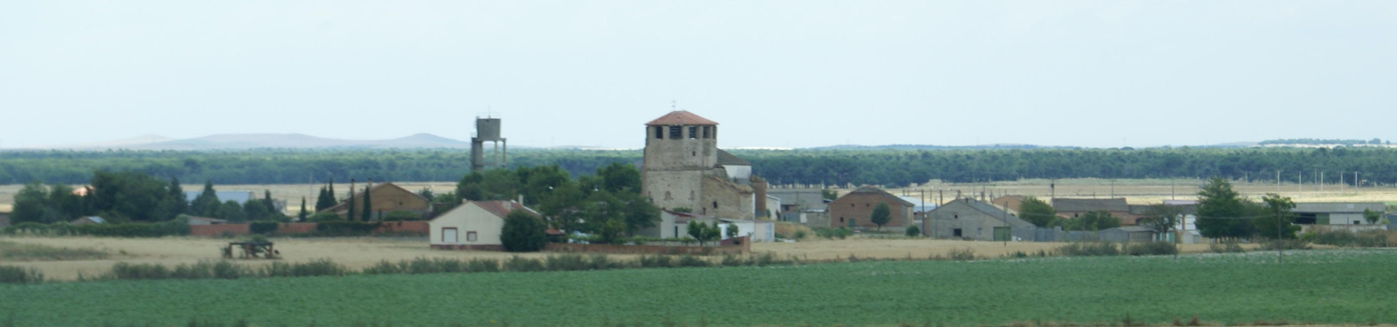 Vista de Almenara de Adaja, Valladolid.